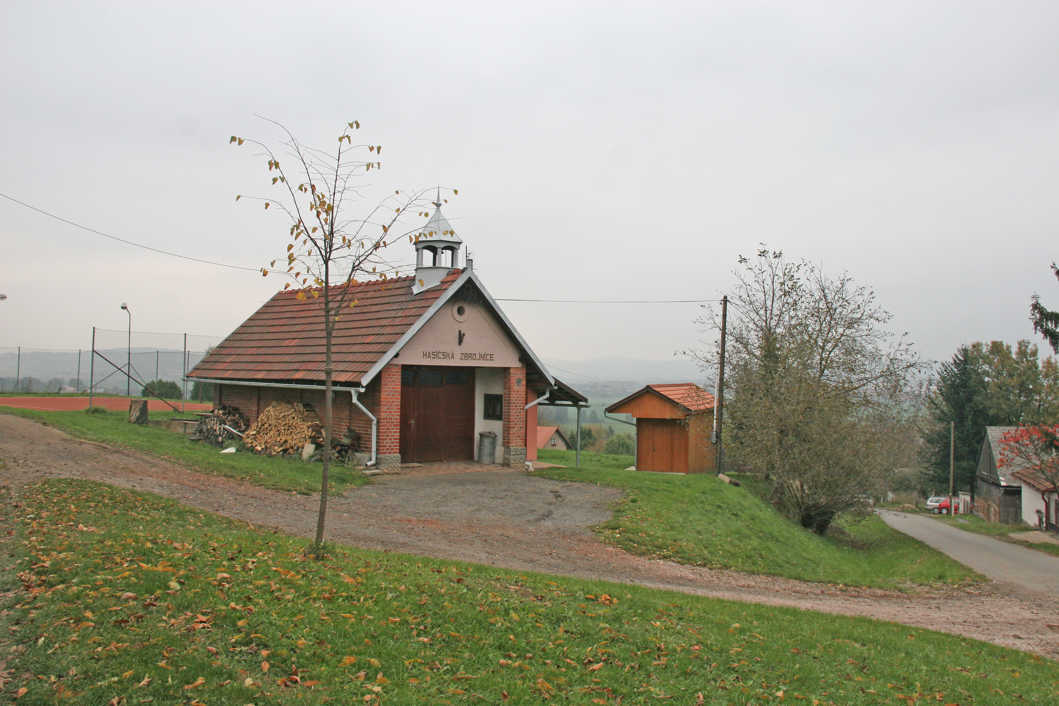 Šlikova Ves hasičská zbrojnice